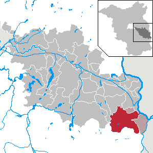 Neuzelle in Brandenburg (Country) - District Oder-Spree